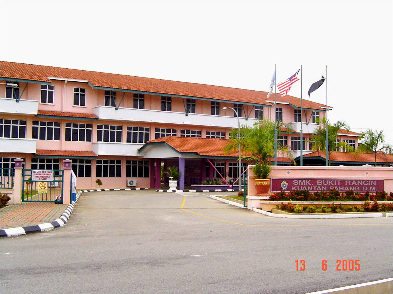 Sekolah